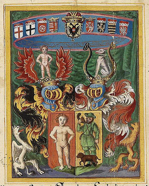 Wappenbesserung durch Ferdinand II. für Hans Viktor und Hans Georg von Scheuchenstuel durch Wappenvereinigung mit den Hofer von Urfahrn (Wien, 4. Januar 1629), Abschrift Leoben, 2. November 1833, 69 x 80 cm; Detail: Wappen